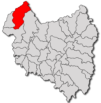 Categorie:Hărţi ale judeţului Covasna